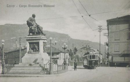 Lecco, largo Manzoni